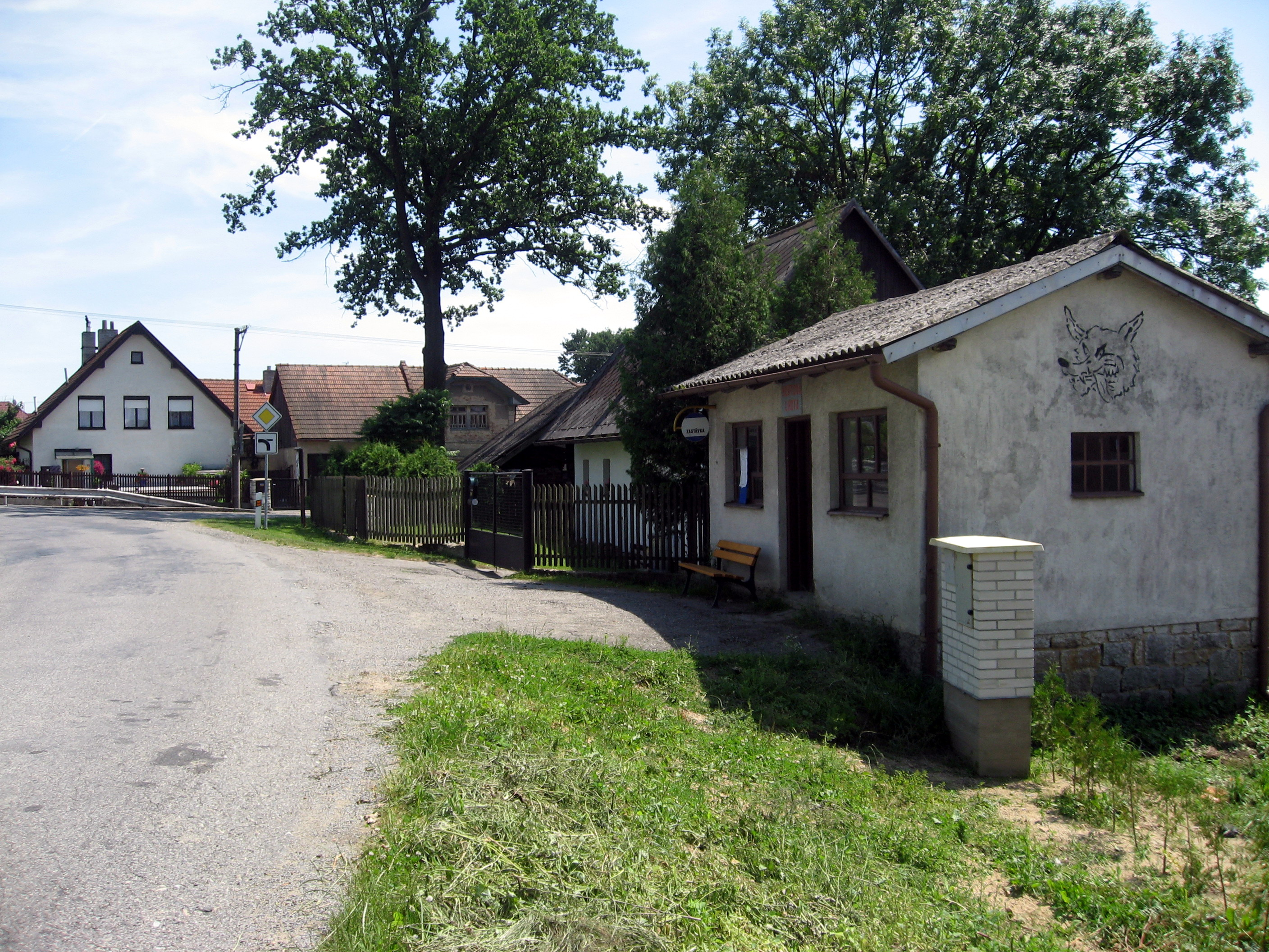 Hurtova Lhota